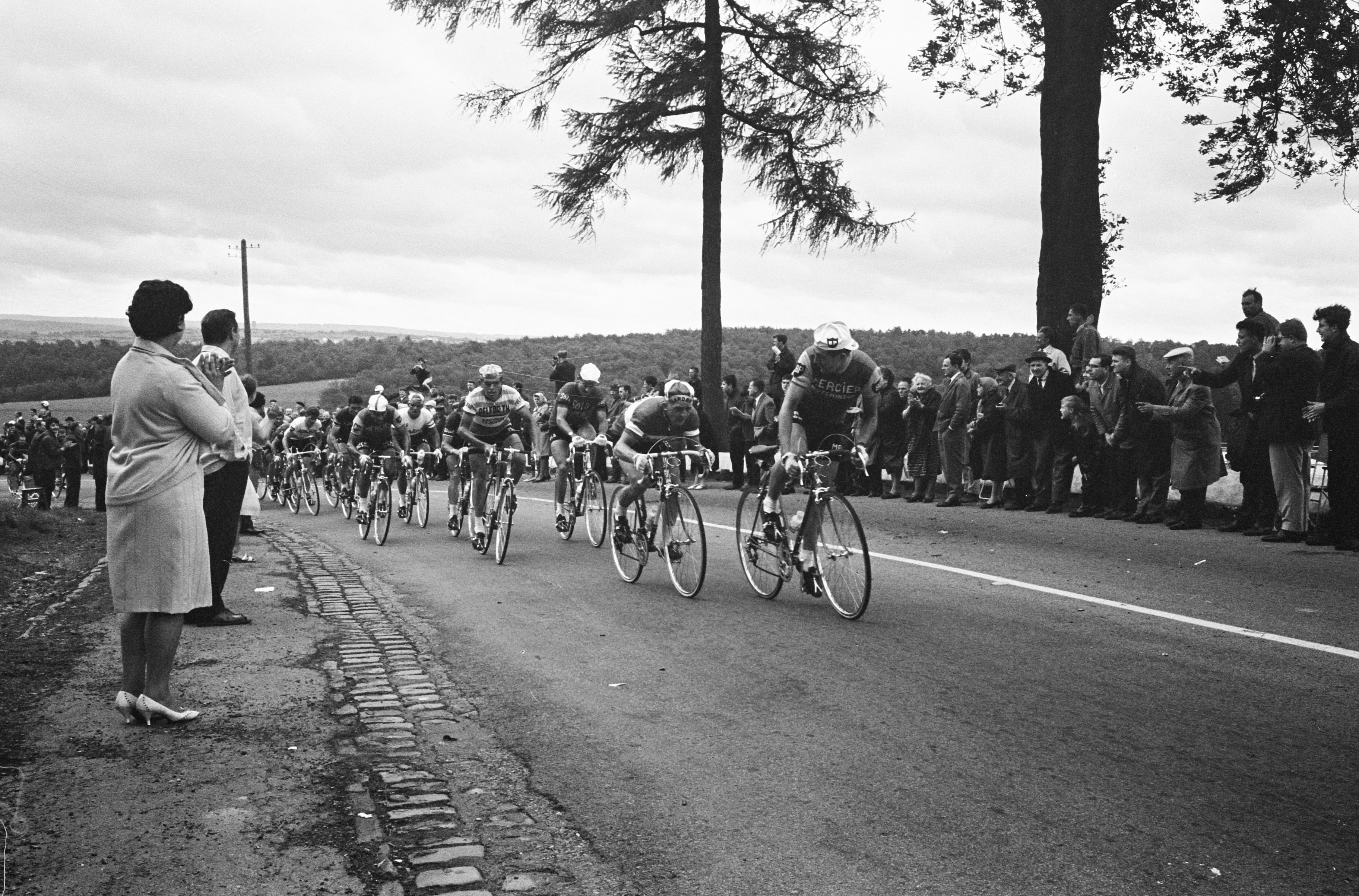 Tour de France , eerste etappe Keulen Luik, de renners beklimmen hier de Cote des Forges in de Ardennen. 22 juni 1965